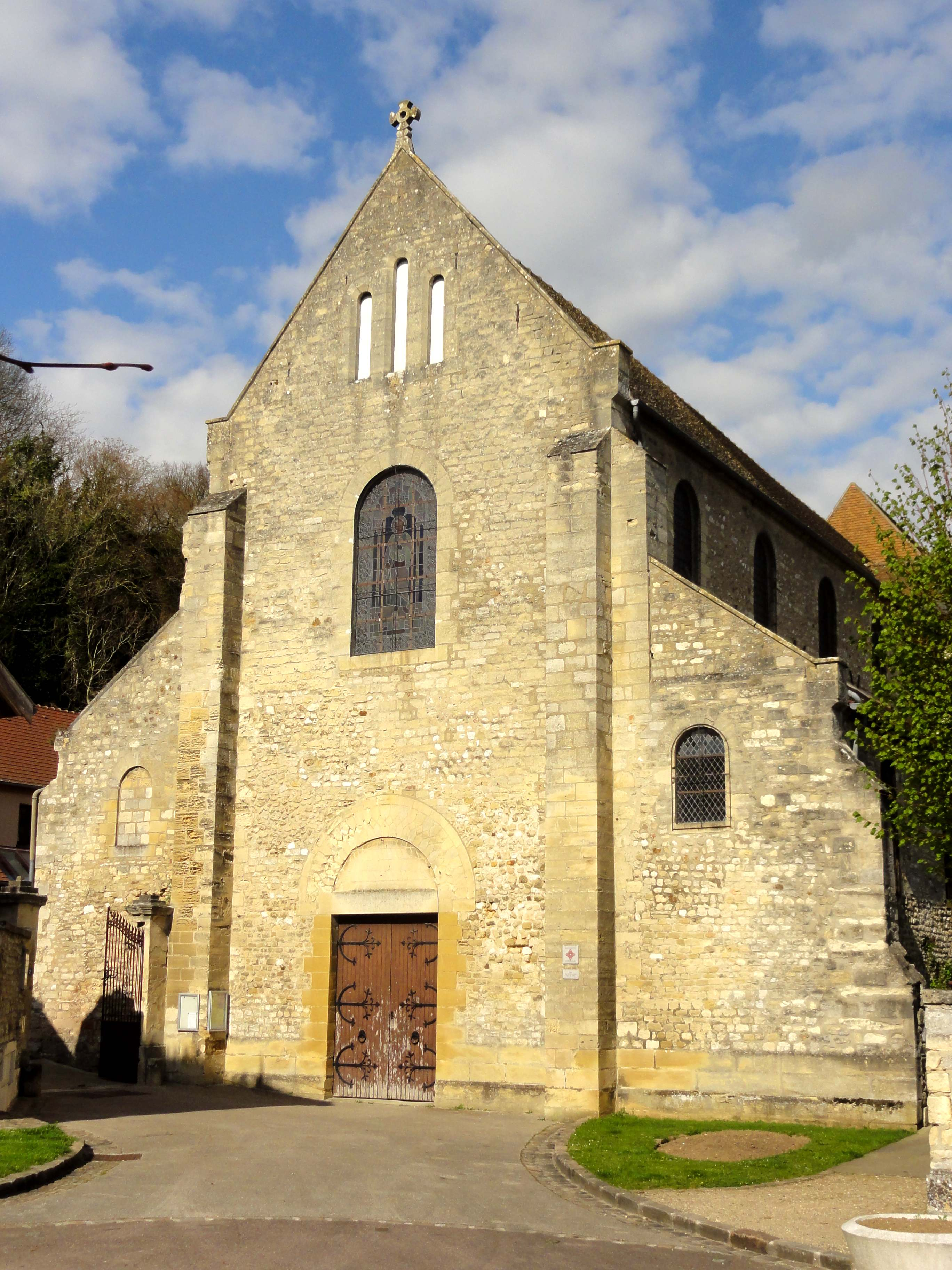 Église Saint-Michel de Juziers - voir titre.